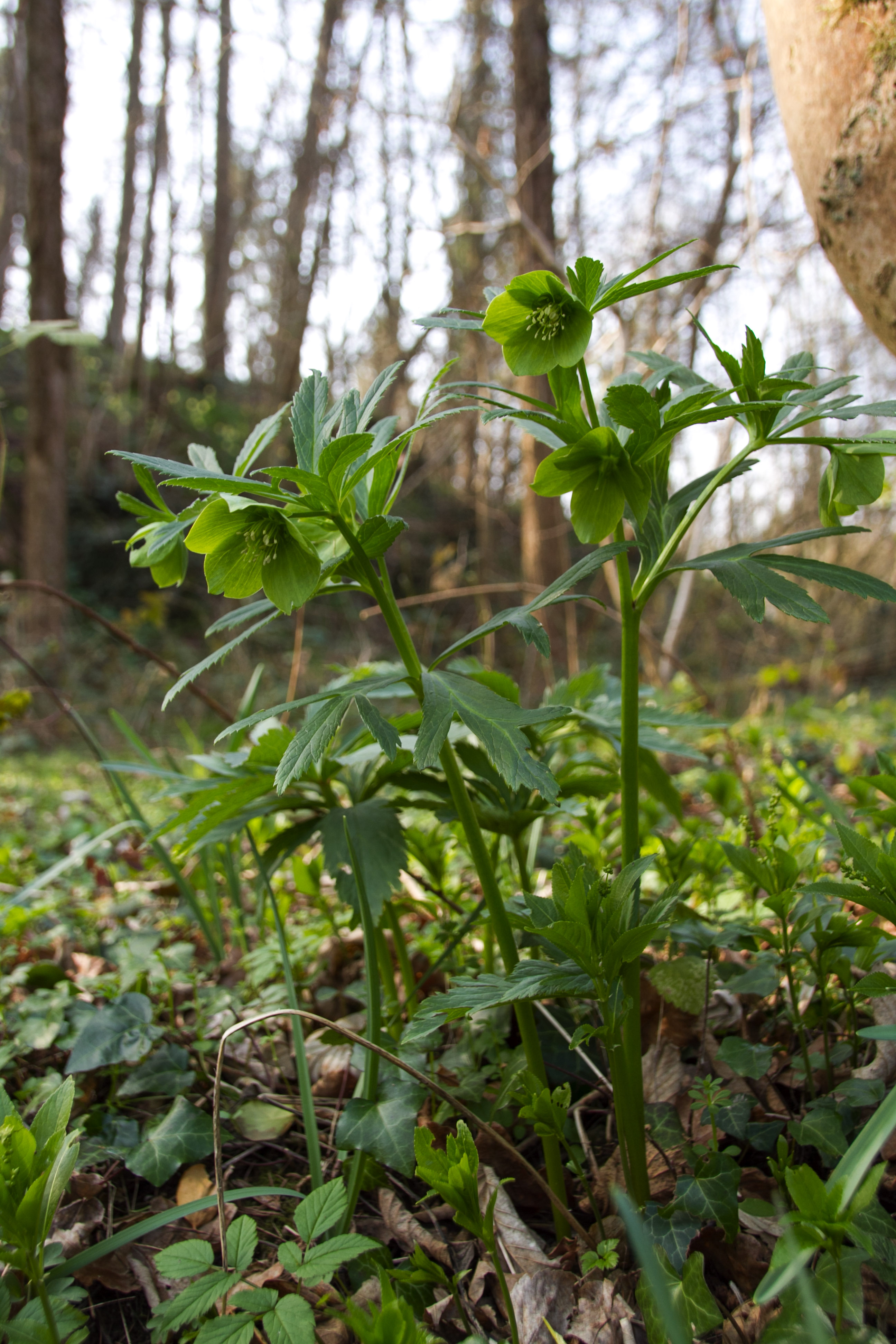 Caillou qui bique (Belgique).